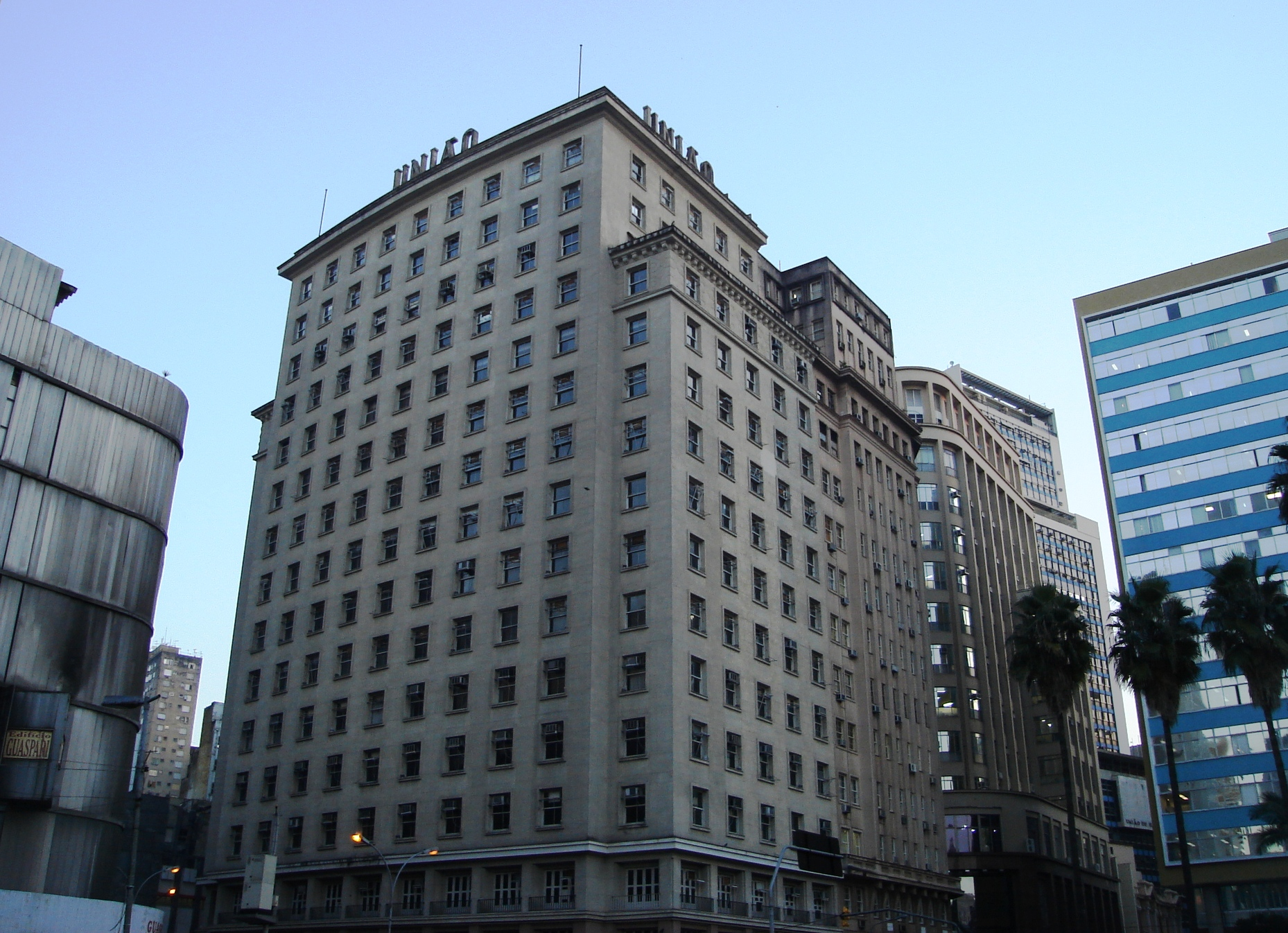 Edifício União, localizado no Centro de Porto Alegre.